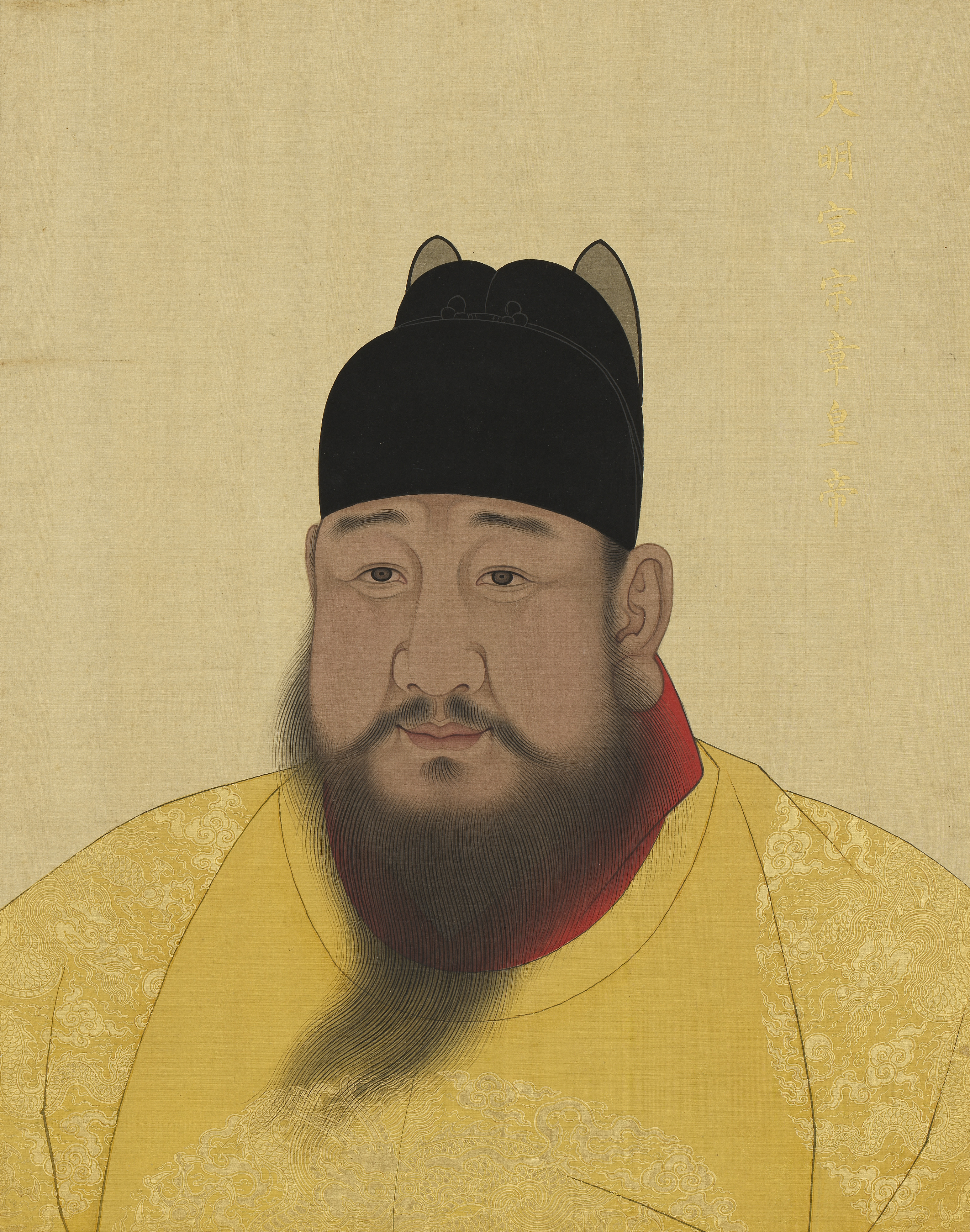 中文（中国大陆）: 作者已经去世超过200年，作品已经进入公有领域。